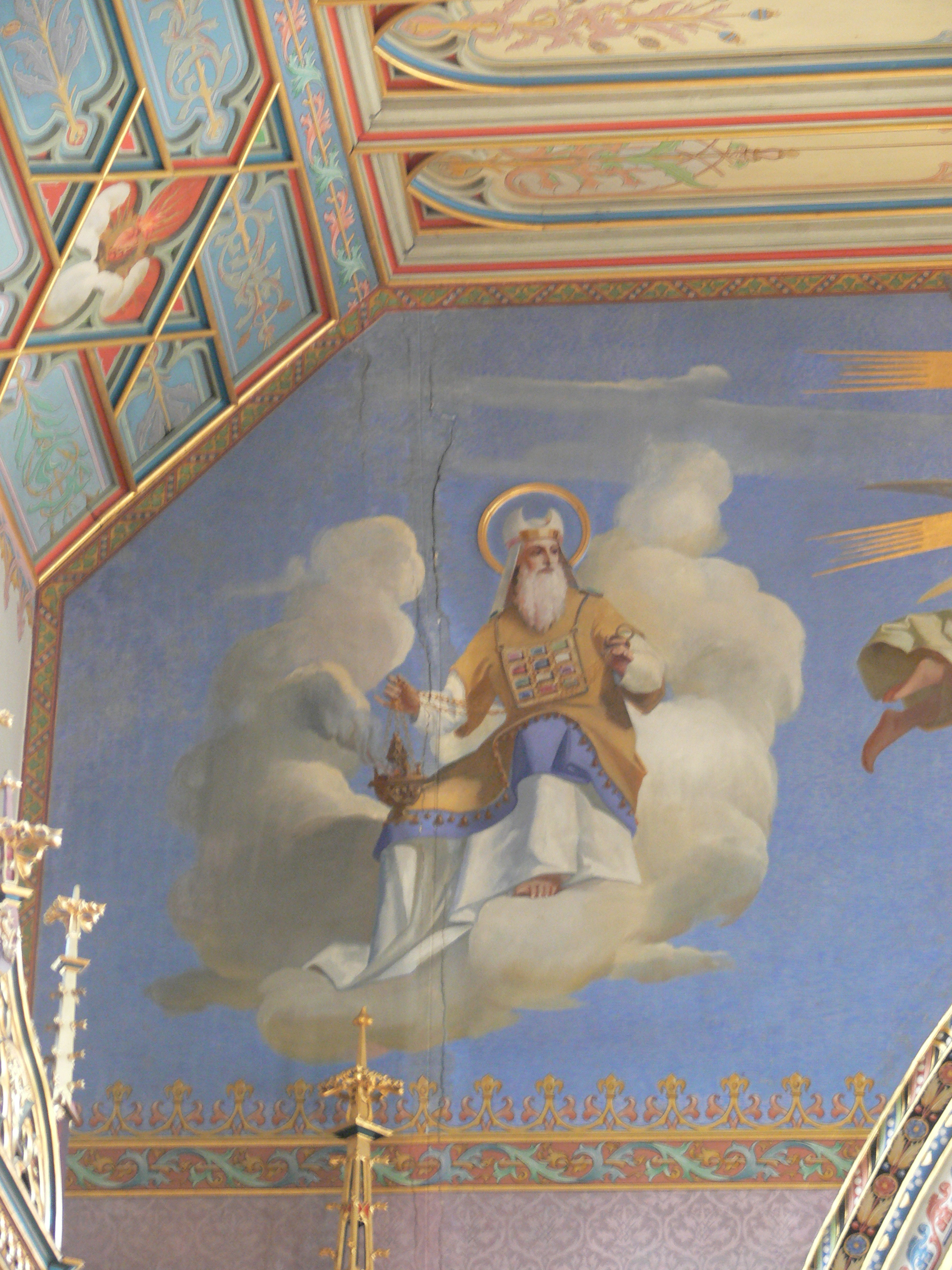 Michael Schmitt: Der Hohepriester Aaron (1912) Detail des Gemäldes an der Chorbogenwand (links) der Pfarrkirche St. Pelagius, Weitnau